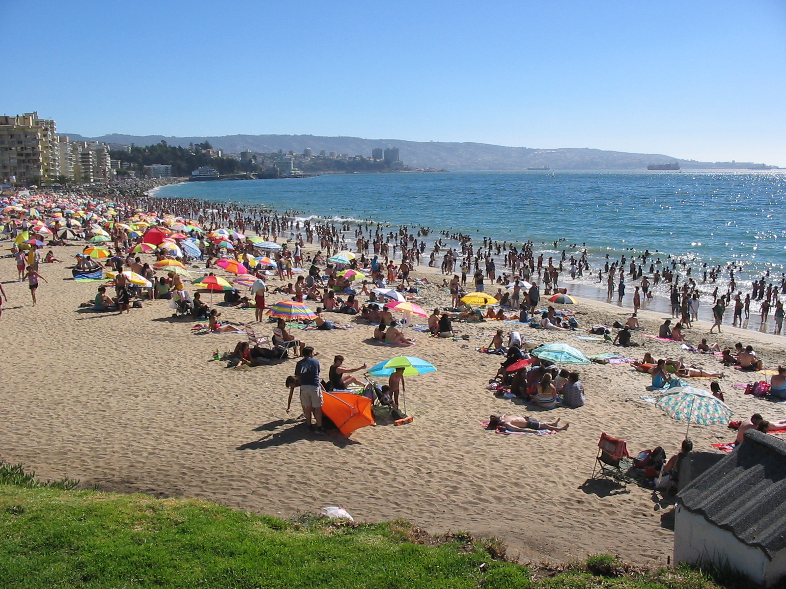 Strand von Viña del Mar (Chile)